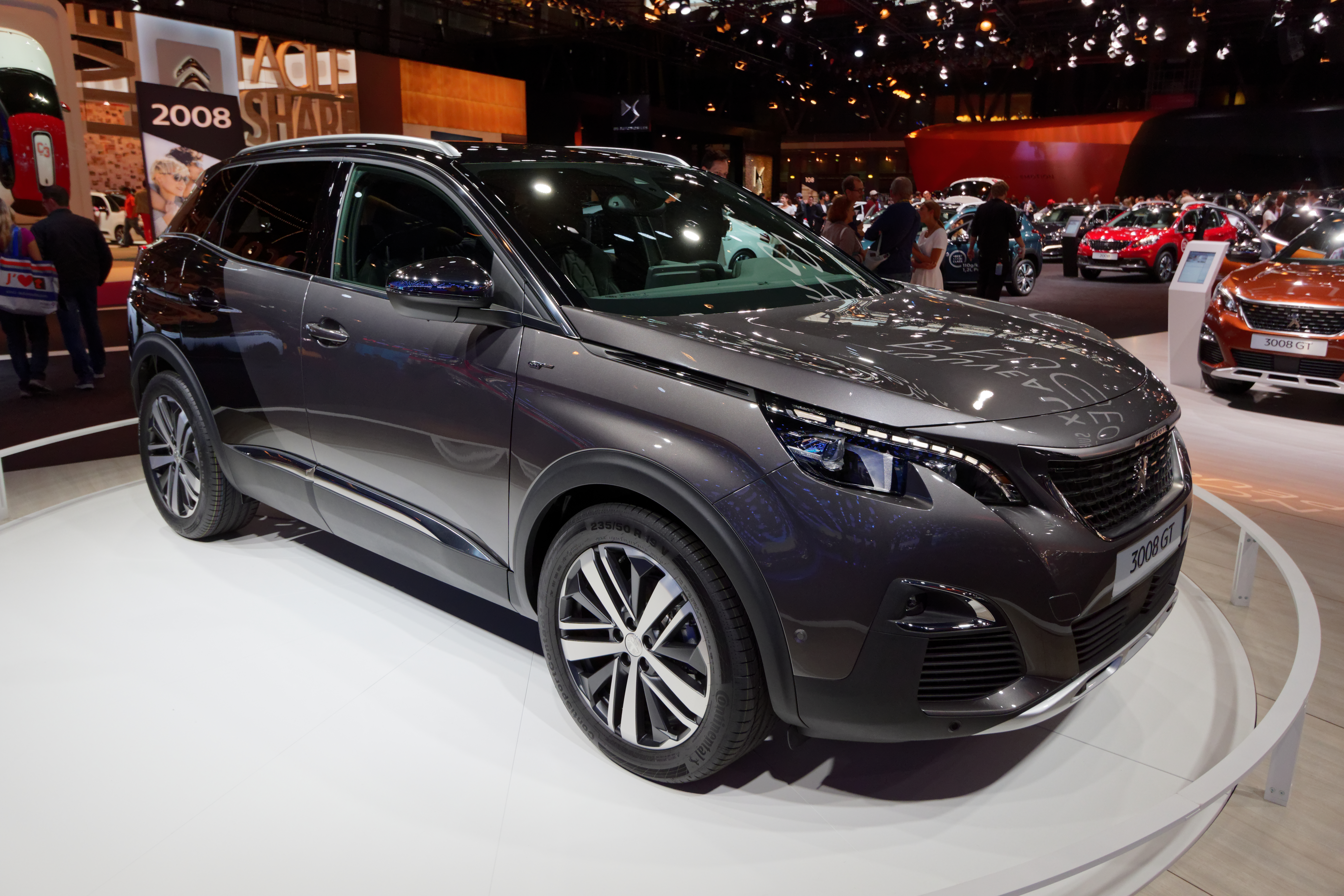 Une Peugeot 3008 GT présentée lors du mondial de l'automobile de Paris 2016.